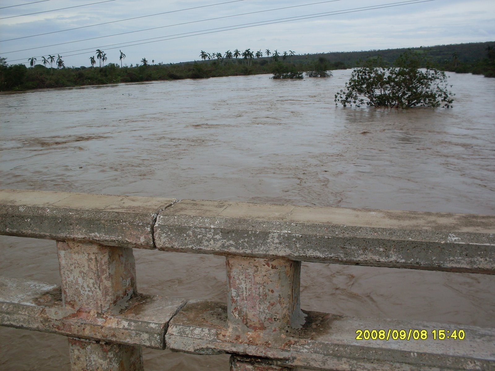 Crecida del Río Mayarí durante el paso de un huracan